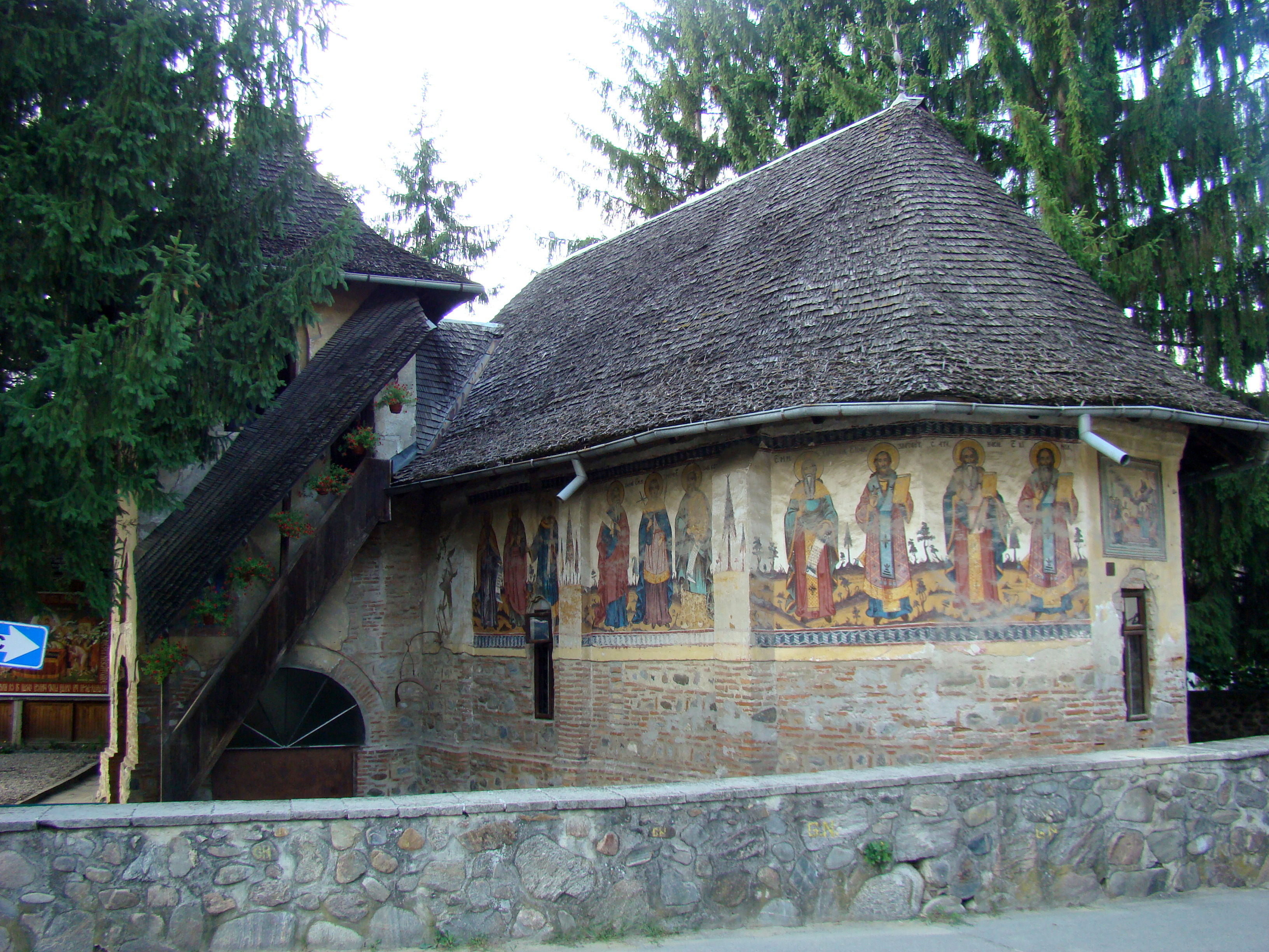 Biserica "Adormirea Maicii Domnului" - Olari, municipiul Curtea de Argeș, str. Cuza Vodă 134